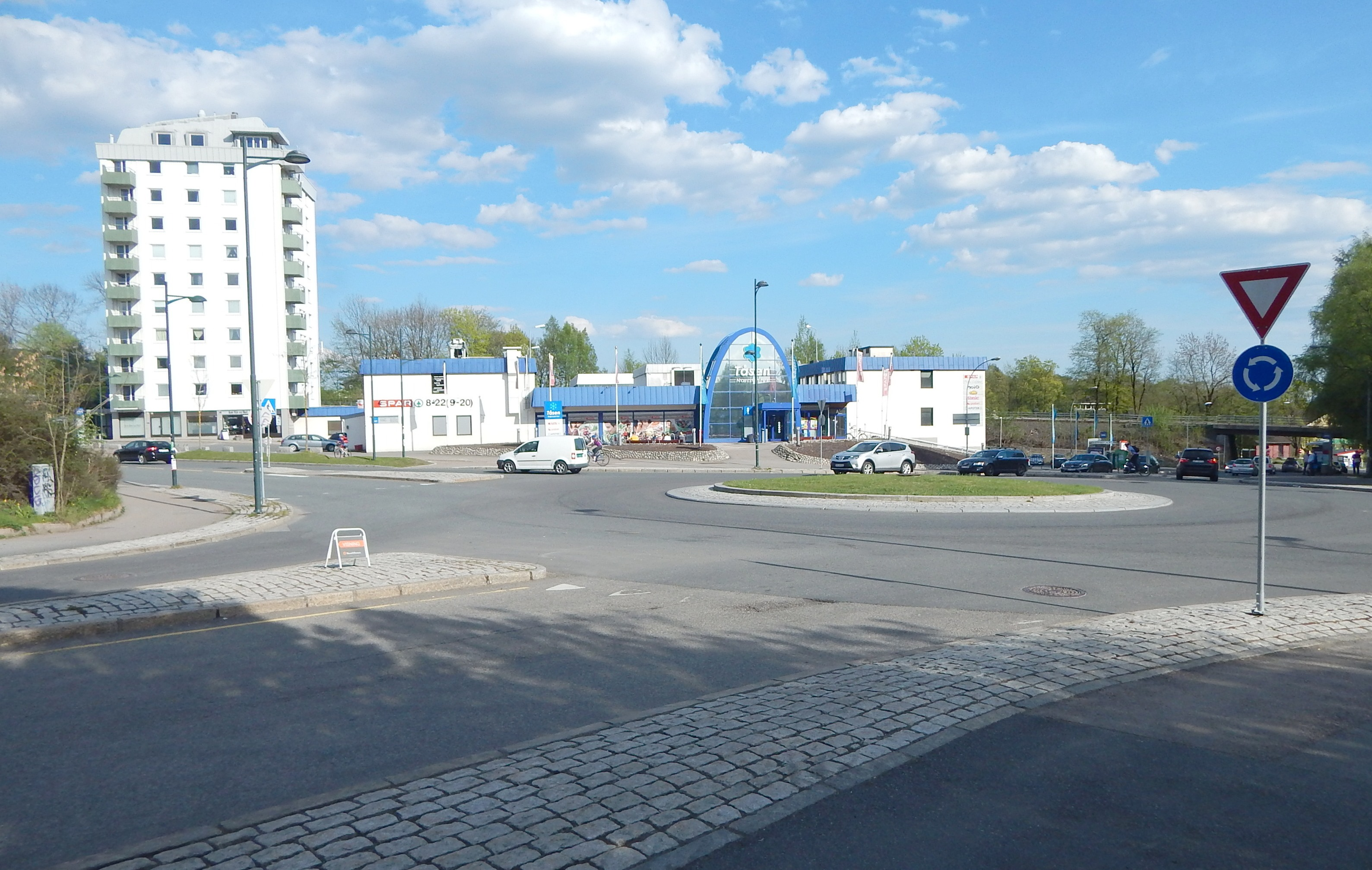 Darre-Jensens plass